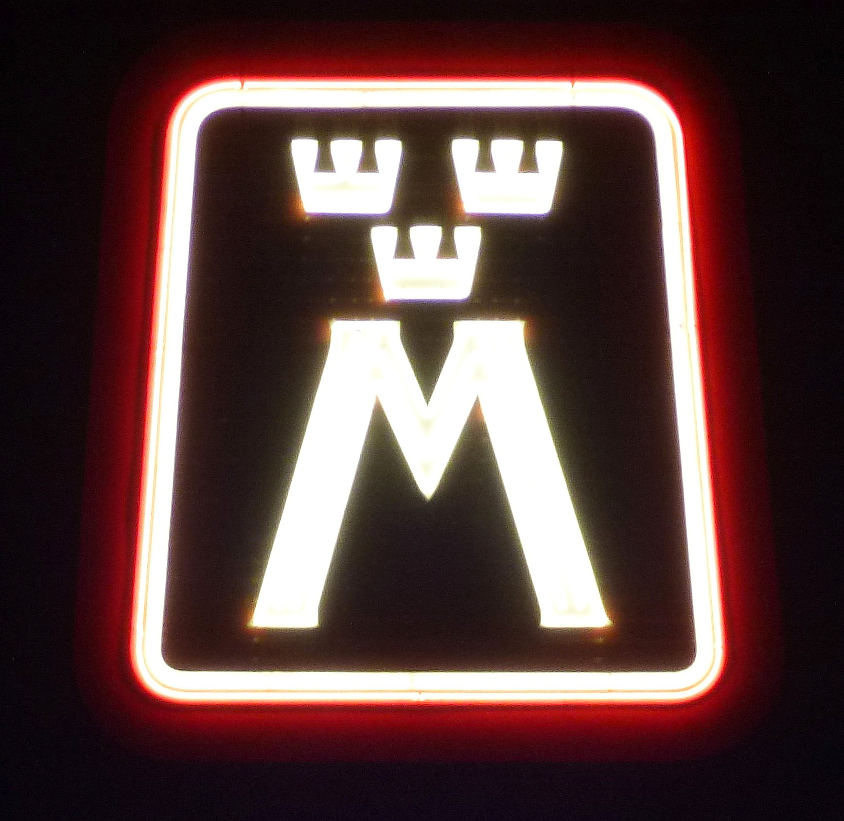 Motormännems ljusskylt vid Fridhemsplan